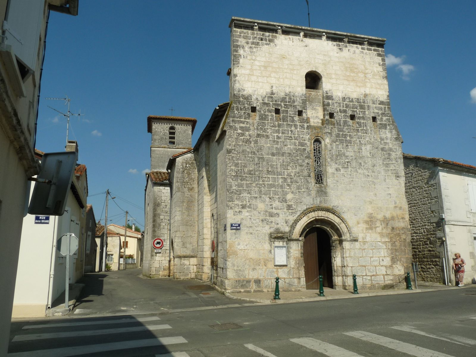 église de l'Isle-d'Espagnac (16), France